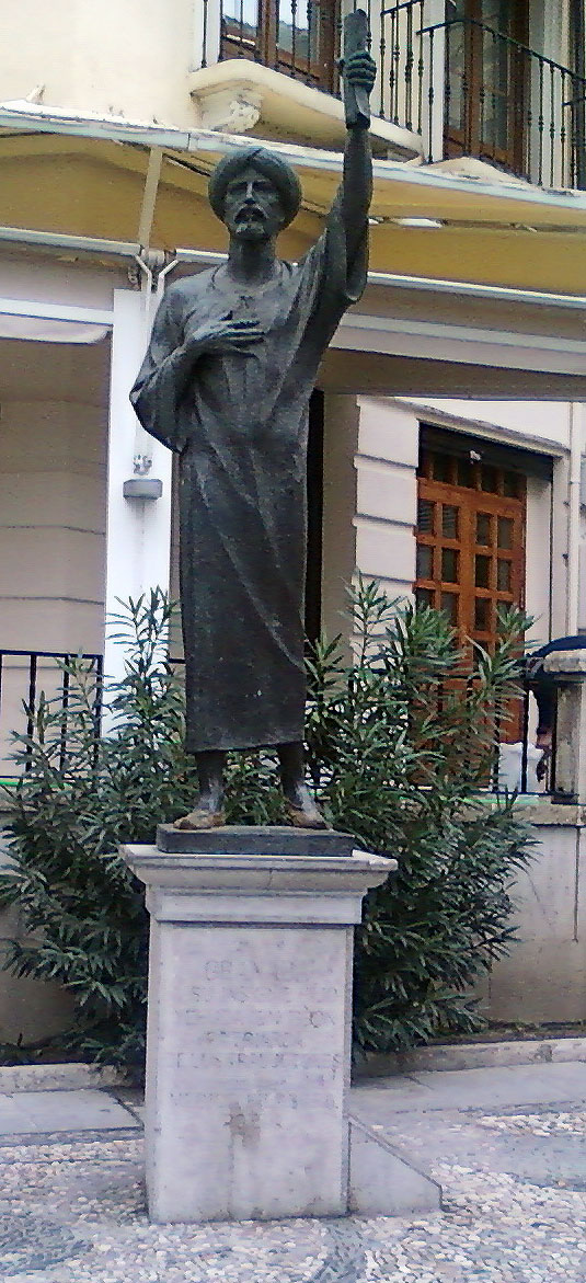 Bild der Statue des Jehuda Ibn Tibbon in Granada, Calle Pavaneras